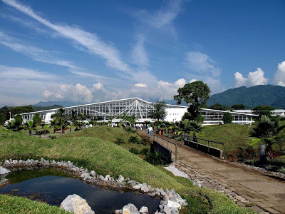 UIXTA